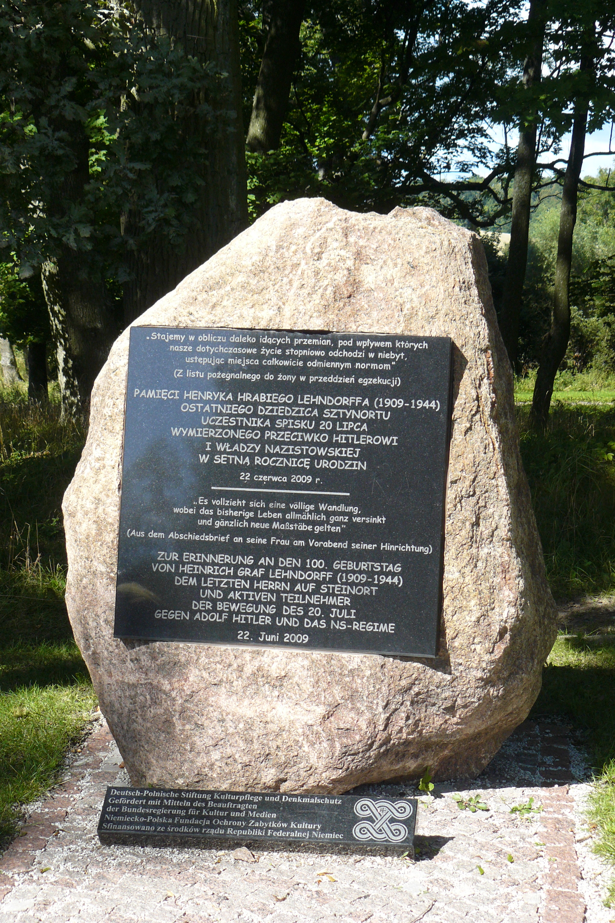 Gedenkstein anlässlich des 100. Geburtstages von Heinrich Graf Lehndorff, dem letzten Herrn auf Steinort und aktiver Teilnehmer des Hitler Attentats am 20. Juli 1944